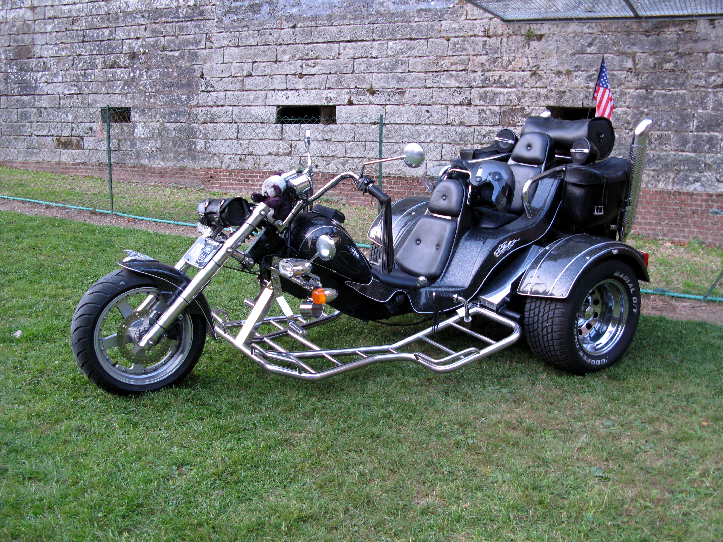 Doullens (Somme, France) - Soirée de la fête country à la Citadelle. Seule "machine" encore exposée après l'entrée dans la forteresse. Peu avant 20 h 30, toutes les autres motos qui firent une parade dans la matinée, en ville, avaient déjà quitté le site.